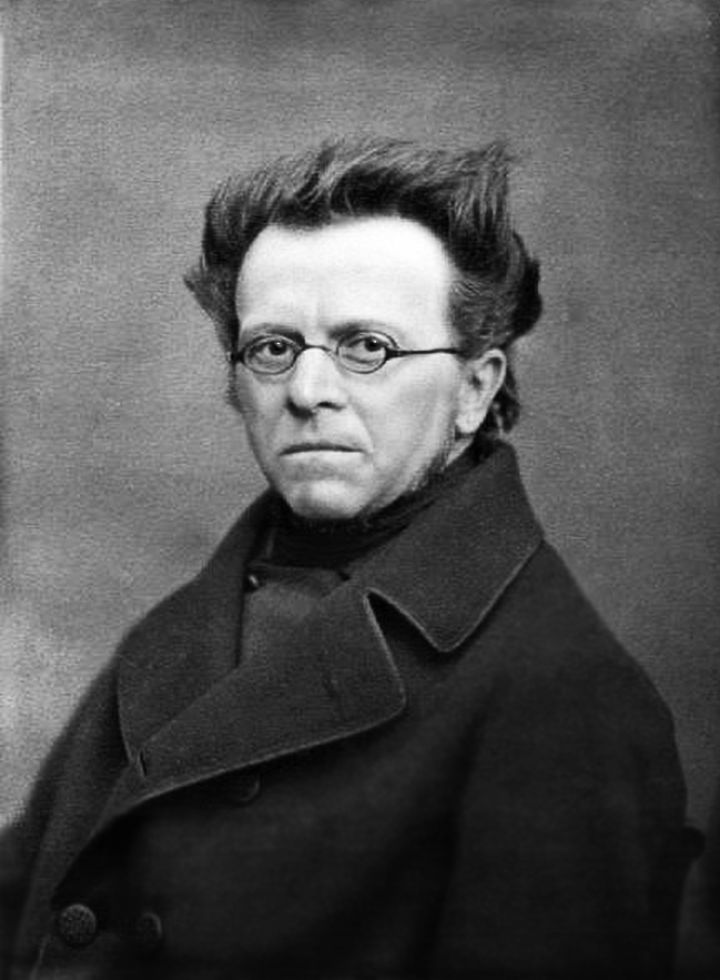 François Laurent (1810-1887)